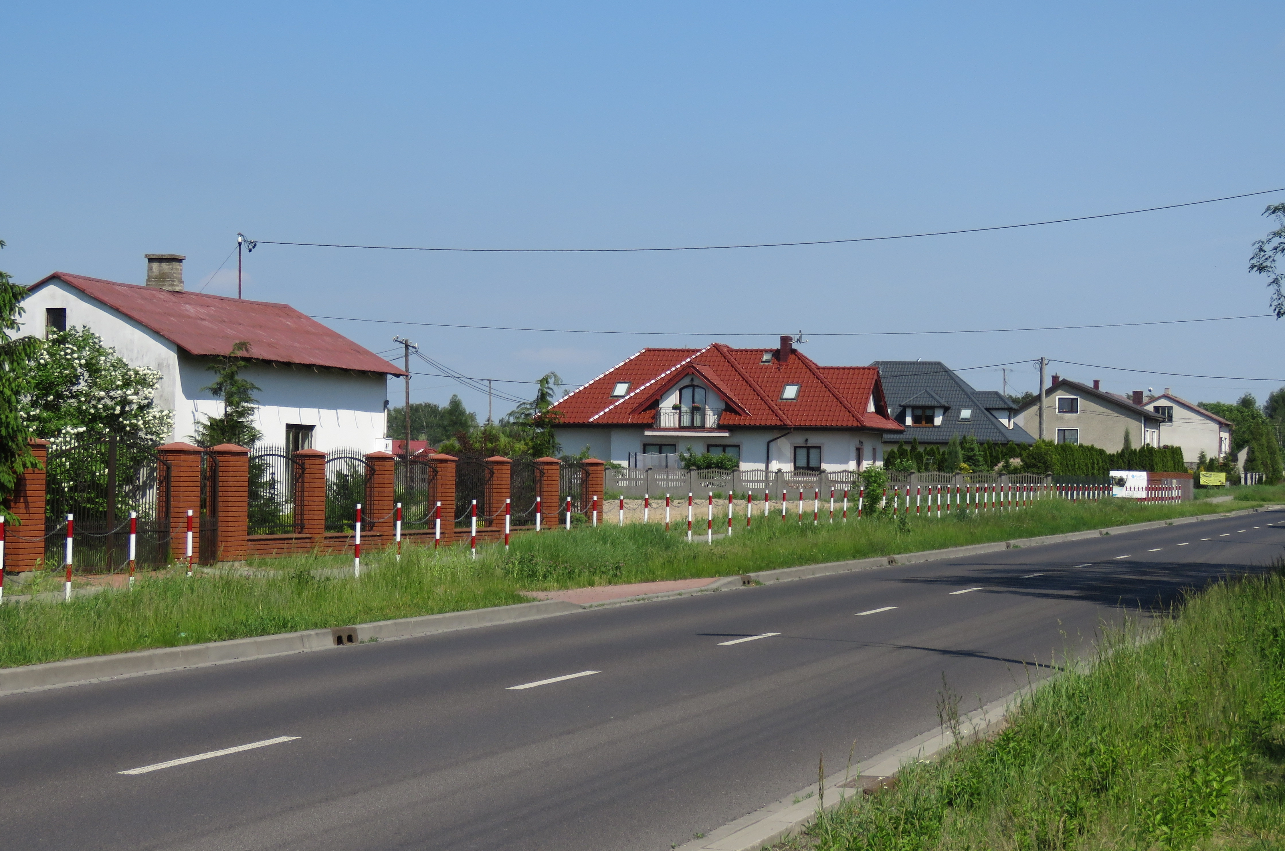 Wilków, gmina Leszno